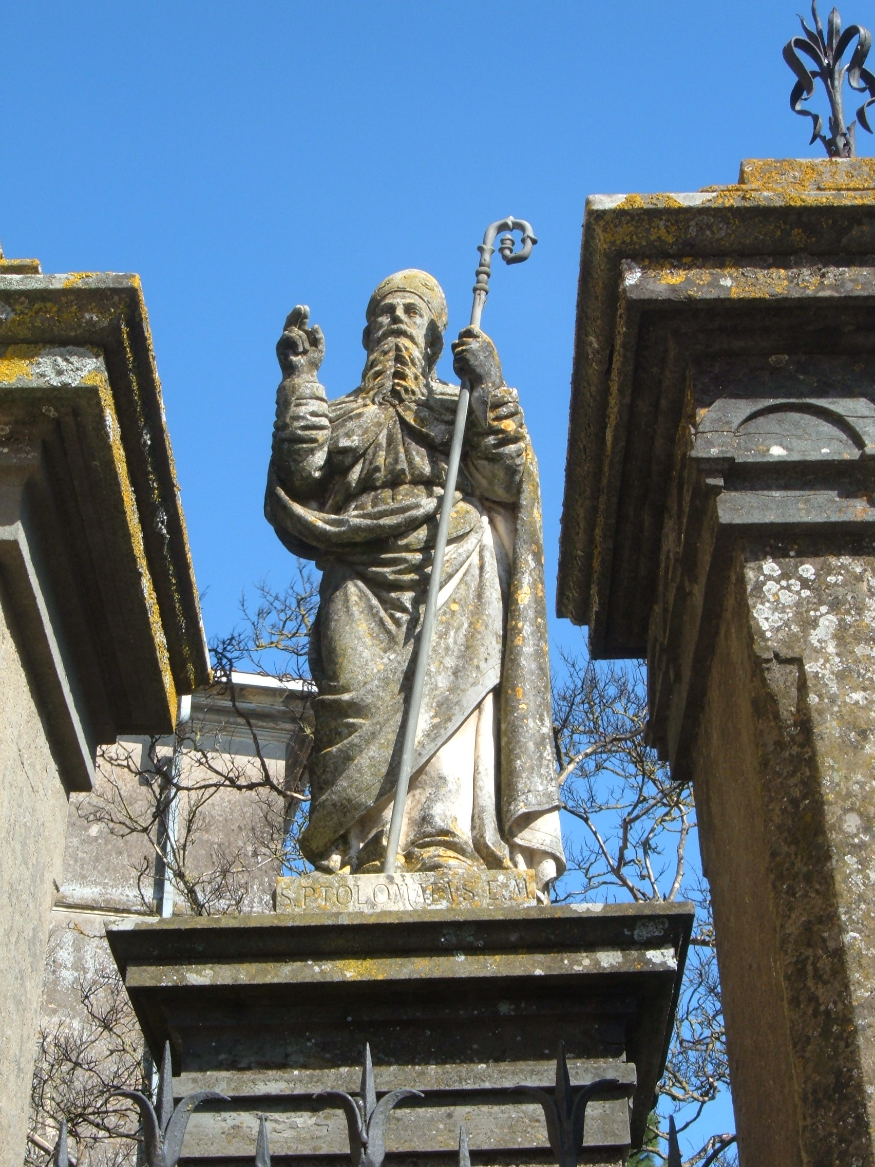 Statua di San Tolomeo all'ingresso del Palazzo vescovile (Nepi)